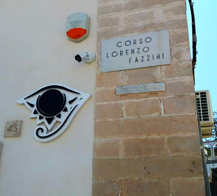 Via dedicata a Lorenzo Fazzini a Vieste